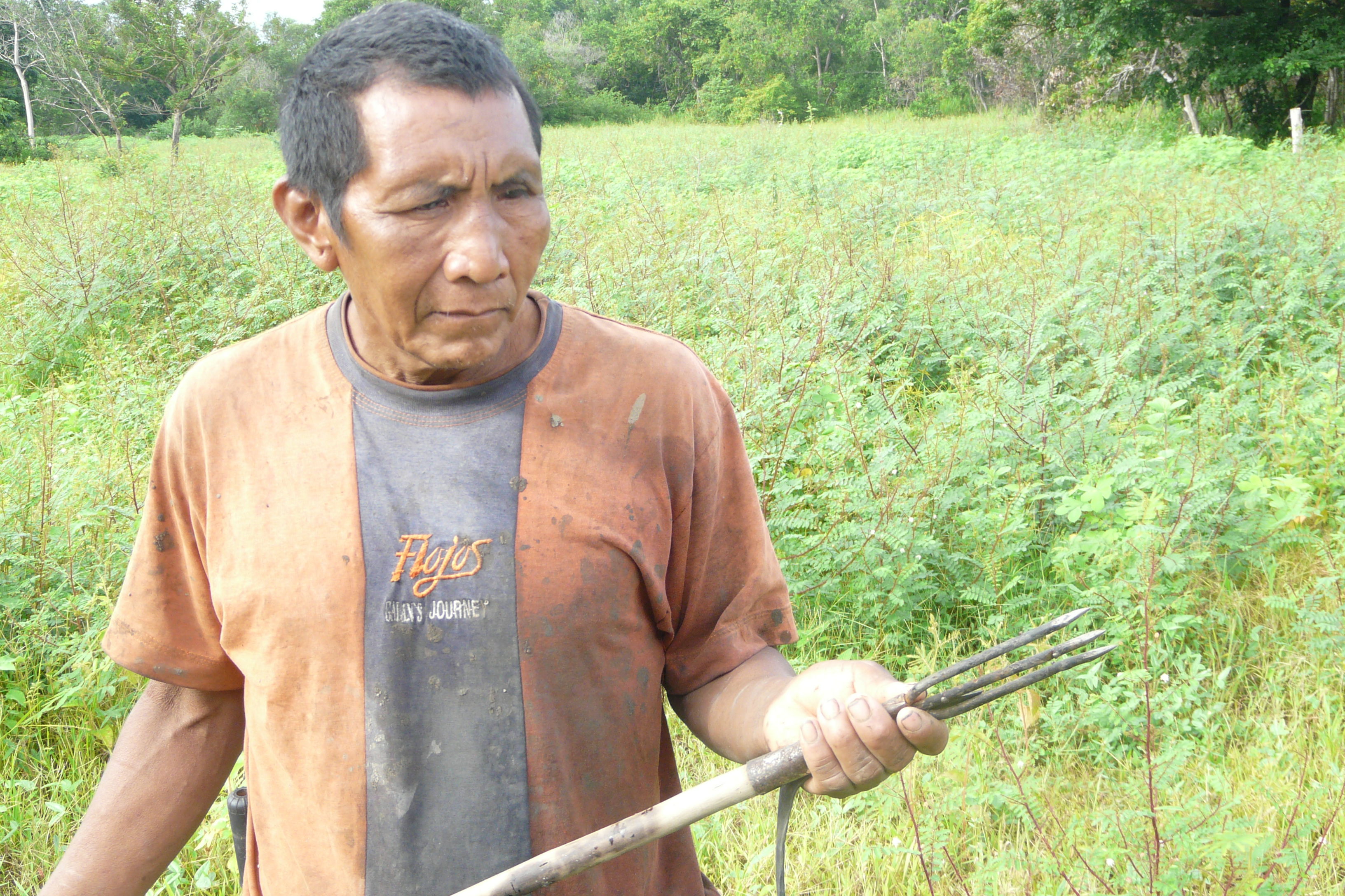 Indígena Panare mostrando un arpón para la pesca.